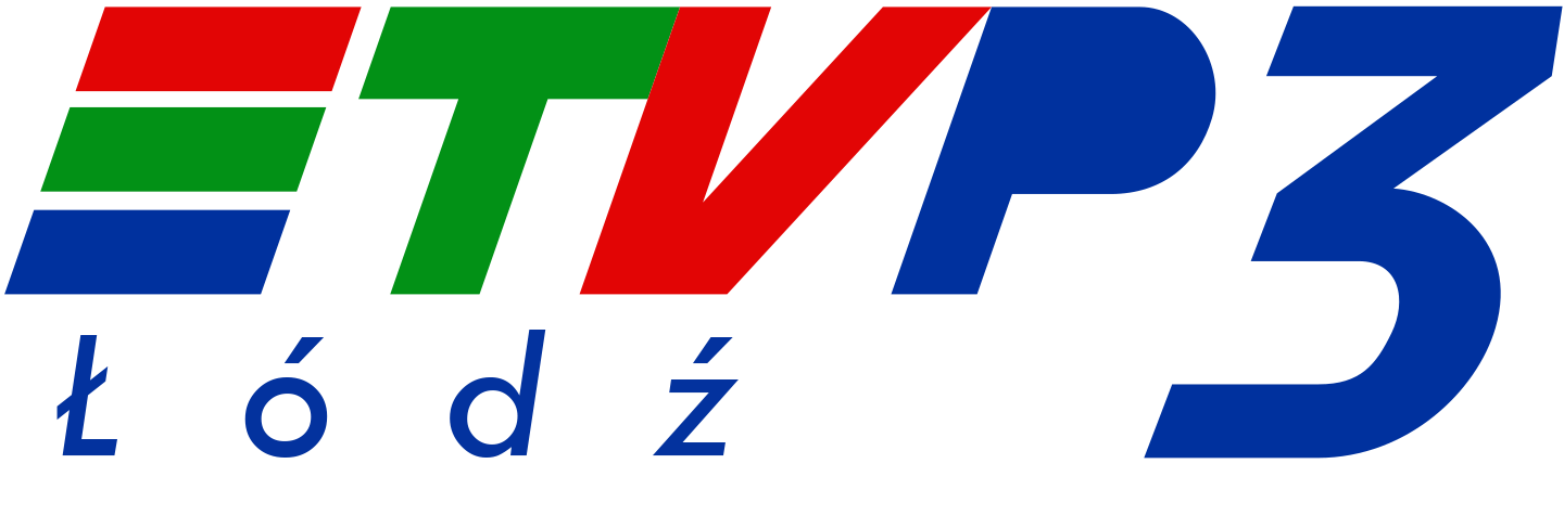 Logo TVP Łódź z lat 2001-2003